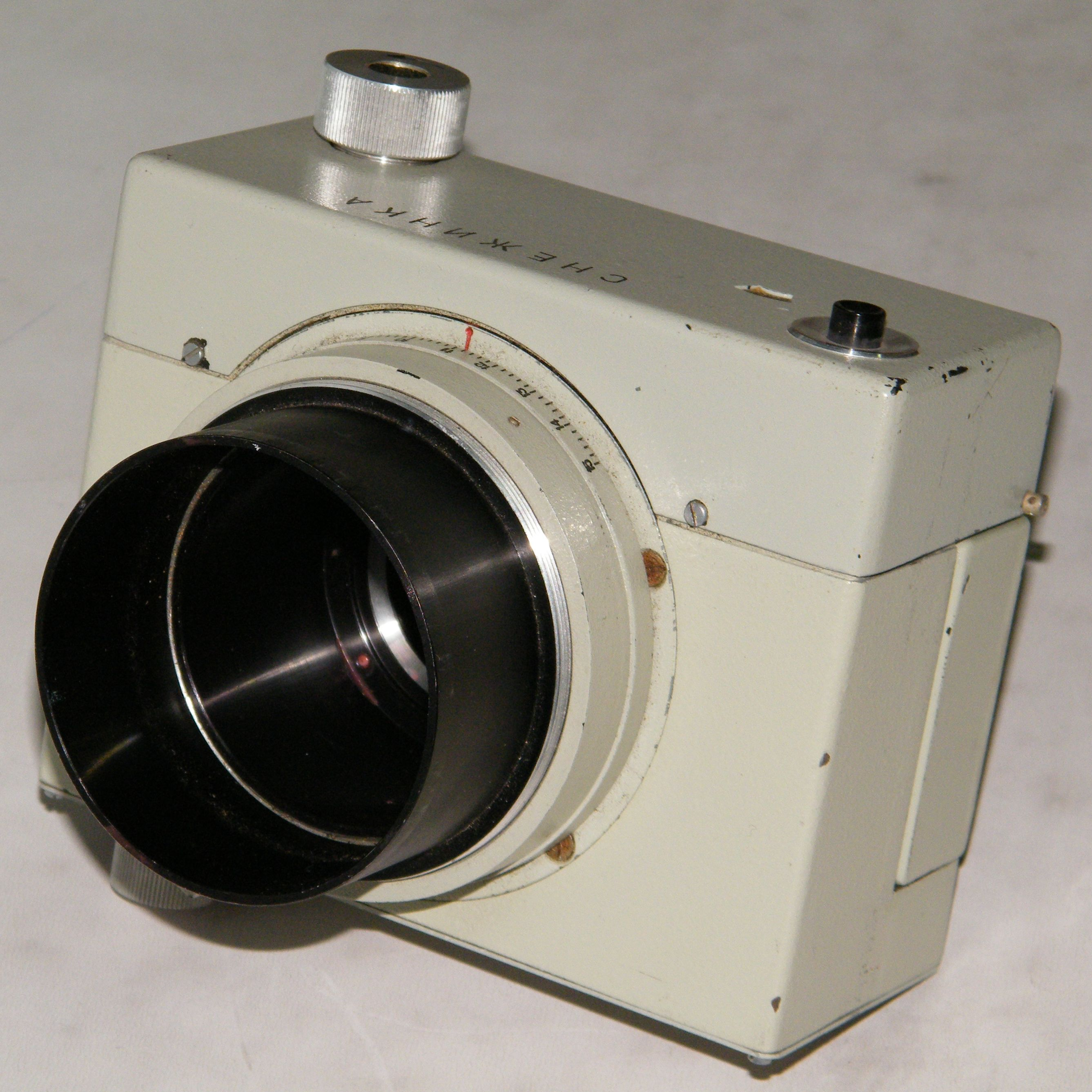 Фоторегистратор СНЕЖИНКА - фотоаппарат, предназначенный для съёмки с экранов осциллографов, радиолокаторов и прочей специальной аппаратуры.